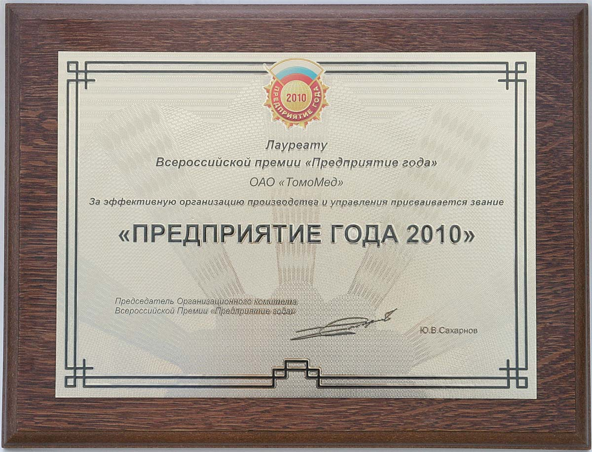 Плакетка для премии "Предприятие года"